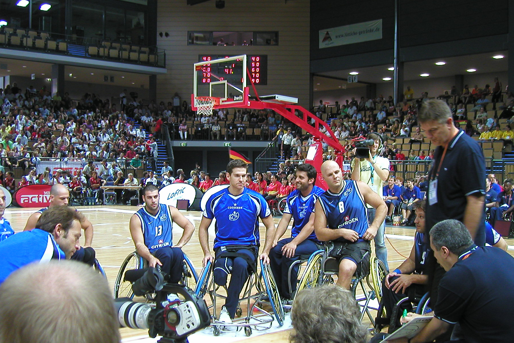 Israelische Rollstuhlbasketball-Nationalmannschaft beim Eröffnungsspiel der Rollstuhlbasketball Europameisterschaften 2007 in Wetzlar